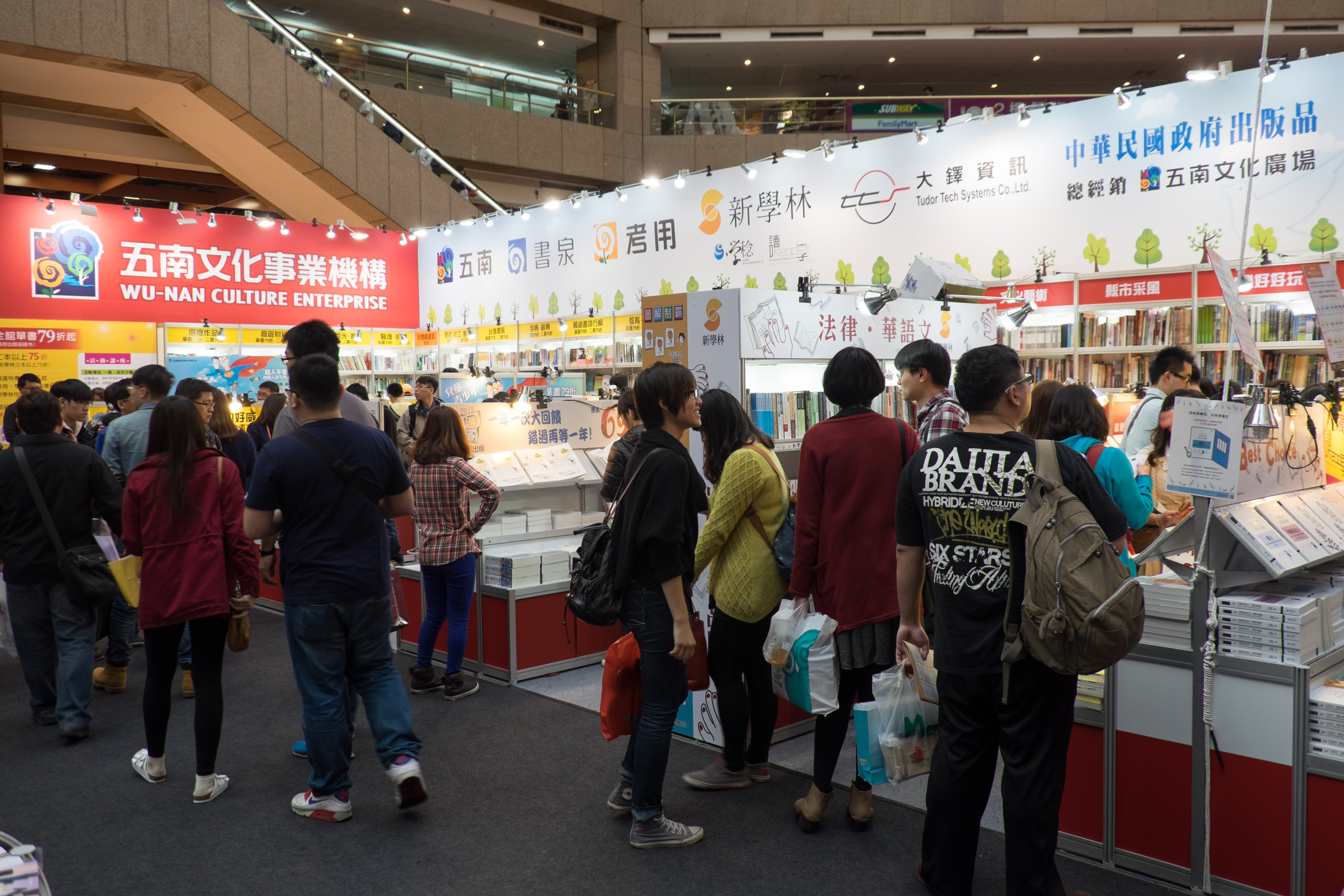 第23屆臺北國際書展，世貿一館五南文化事業機構攤位。